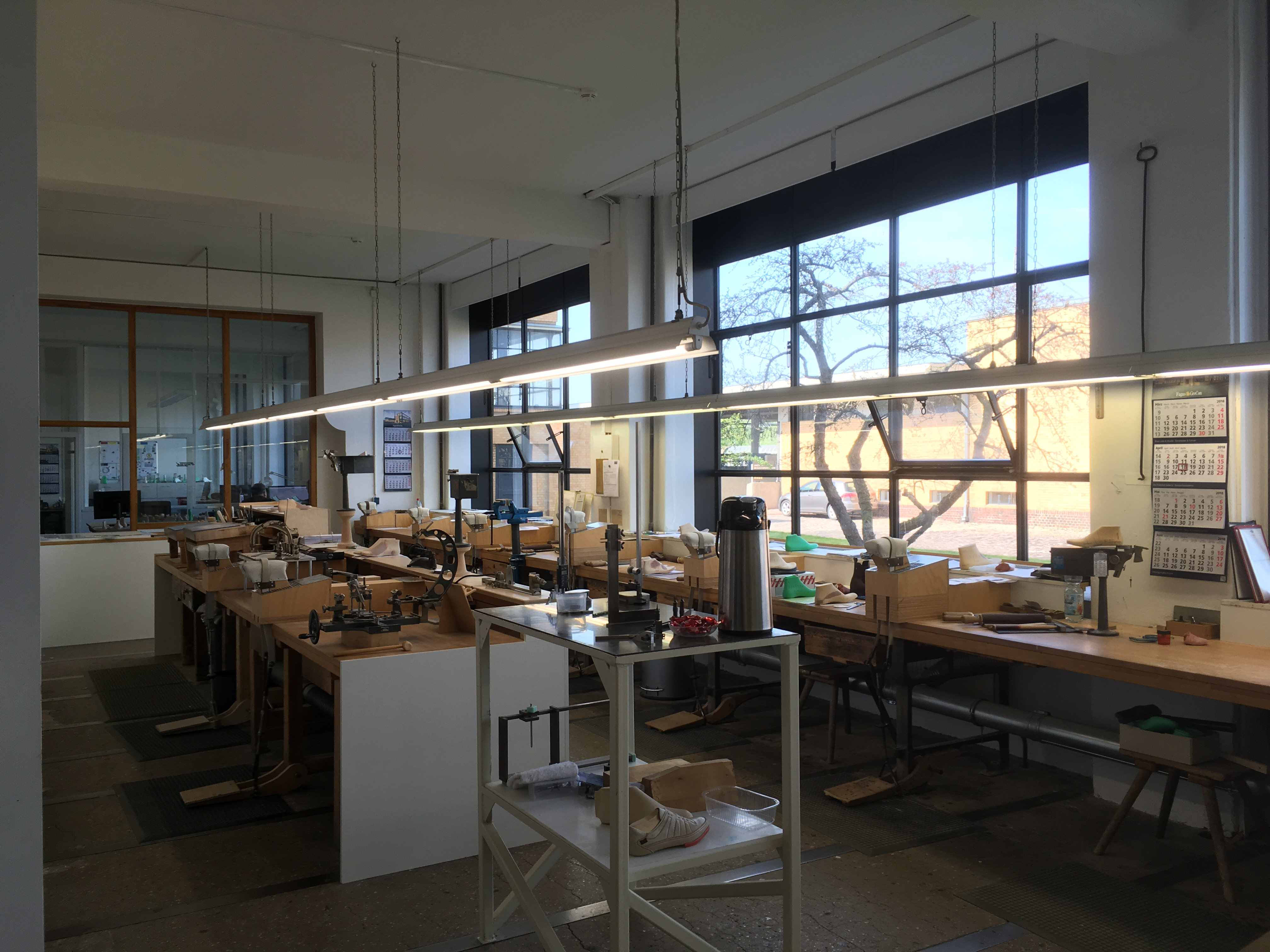 Werkbänke an denen die Leisten im Fagus-Werk handgefertigt werden.